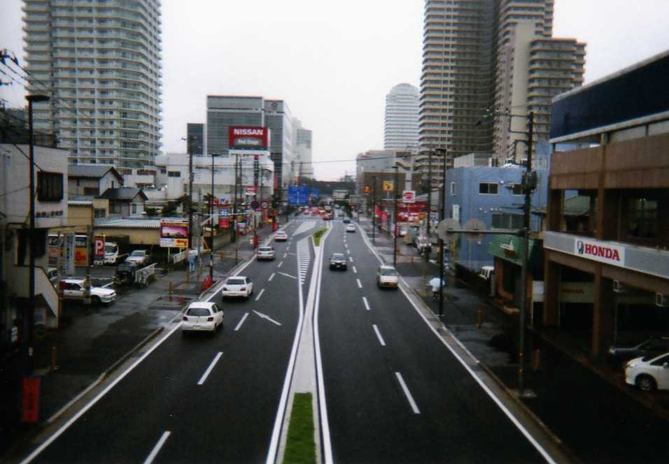 国道17号・与野大宮道路を歩道橋から。2007年初夏に利用者が撮影。